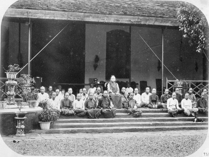 Foto. Raden Ayu, de vrouw van Tjondro Negoro, regent van Koedoes, met haar vrouwelijke bedienden